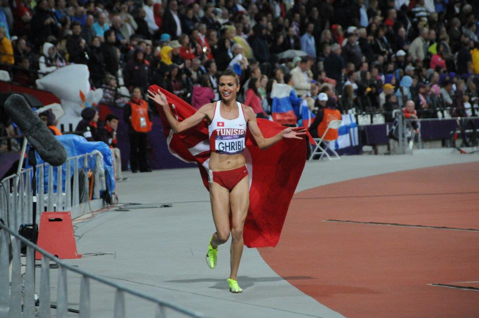 Habiba Ghribi fêtant sa medaille d'argent au stade olympique de Londres